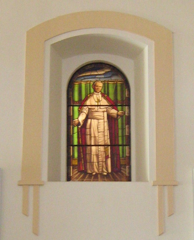 Vitral del Papa Juan Pablo II en la Basílica de Yarumal, Antioquia, Colombia.